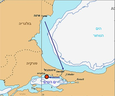 נתיב הפלגתה של הסלבדור עד לטביעתה